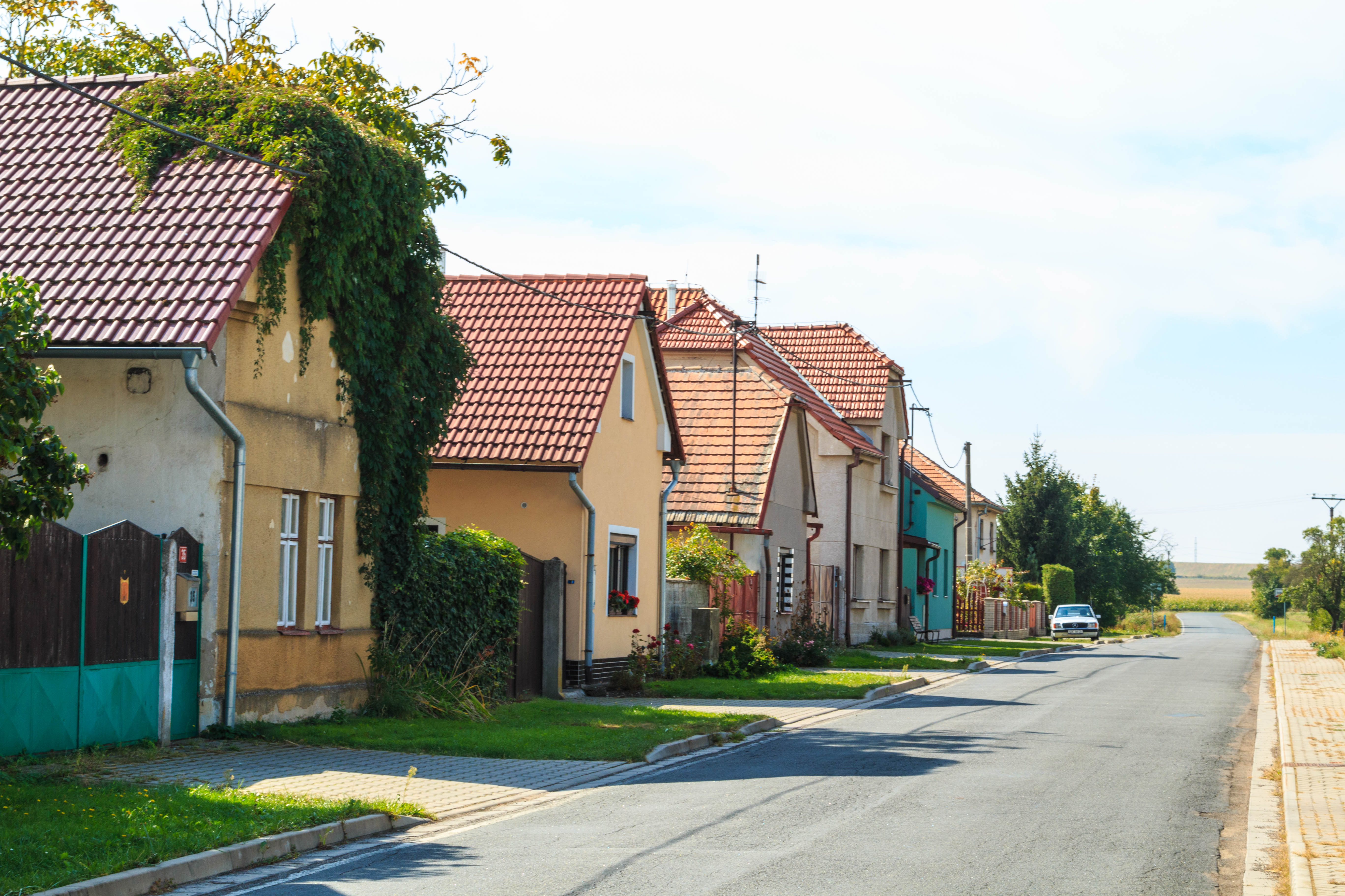 Dománovice čp. 35